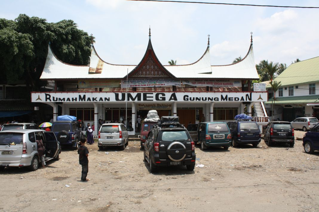 Foto Rumah Makan Umega Gunung Medan di Kabupaten Dharmasraya.